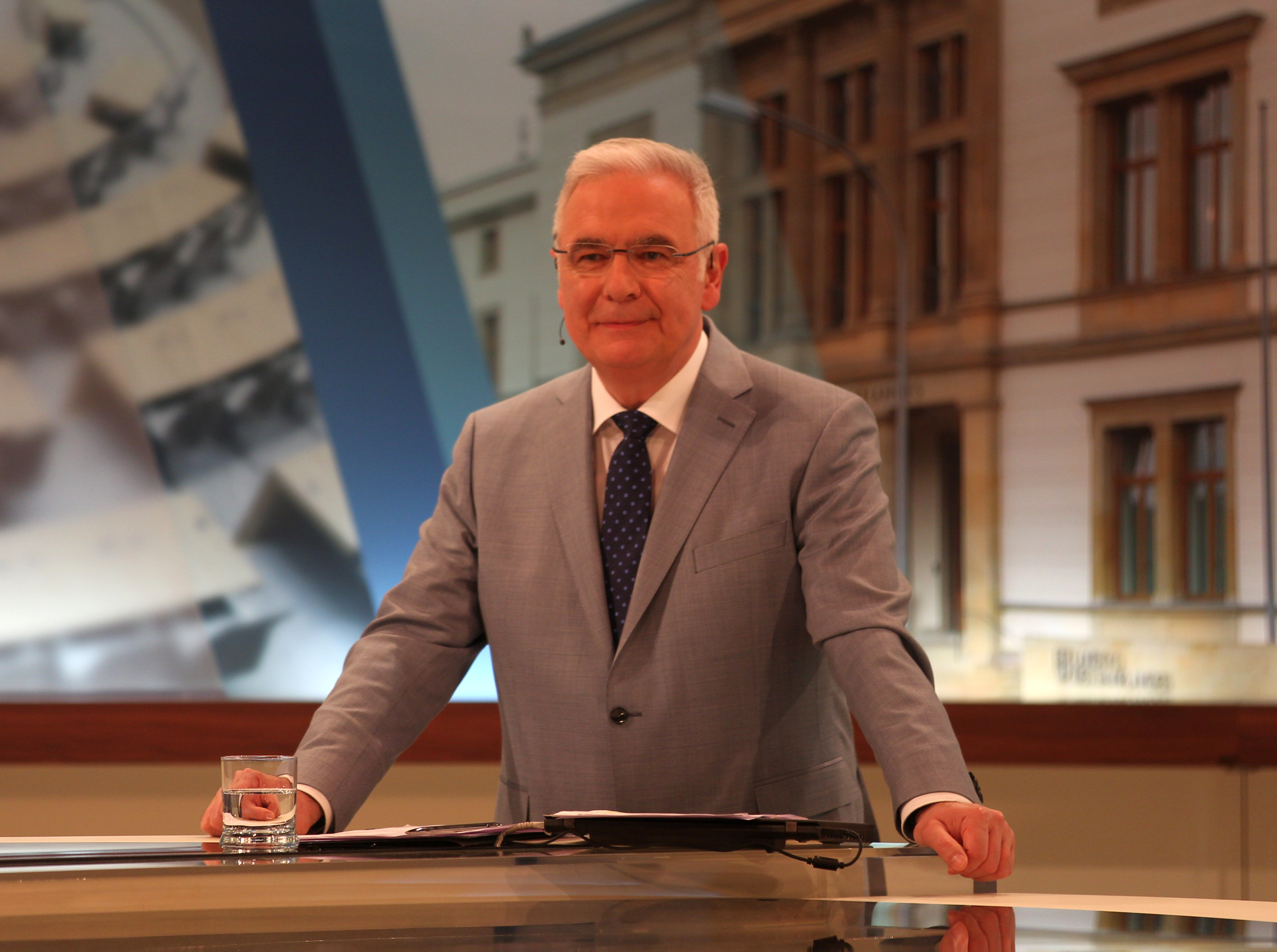 Norbert Klein (Chefredakteur SR; Das Erste) beim Wahlabend zur Landtagswahl im Saarland